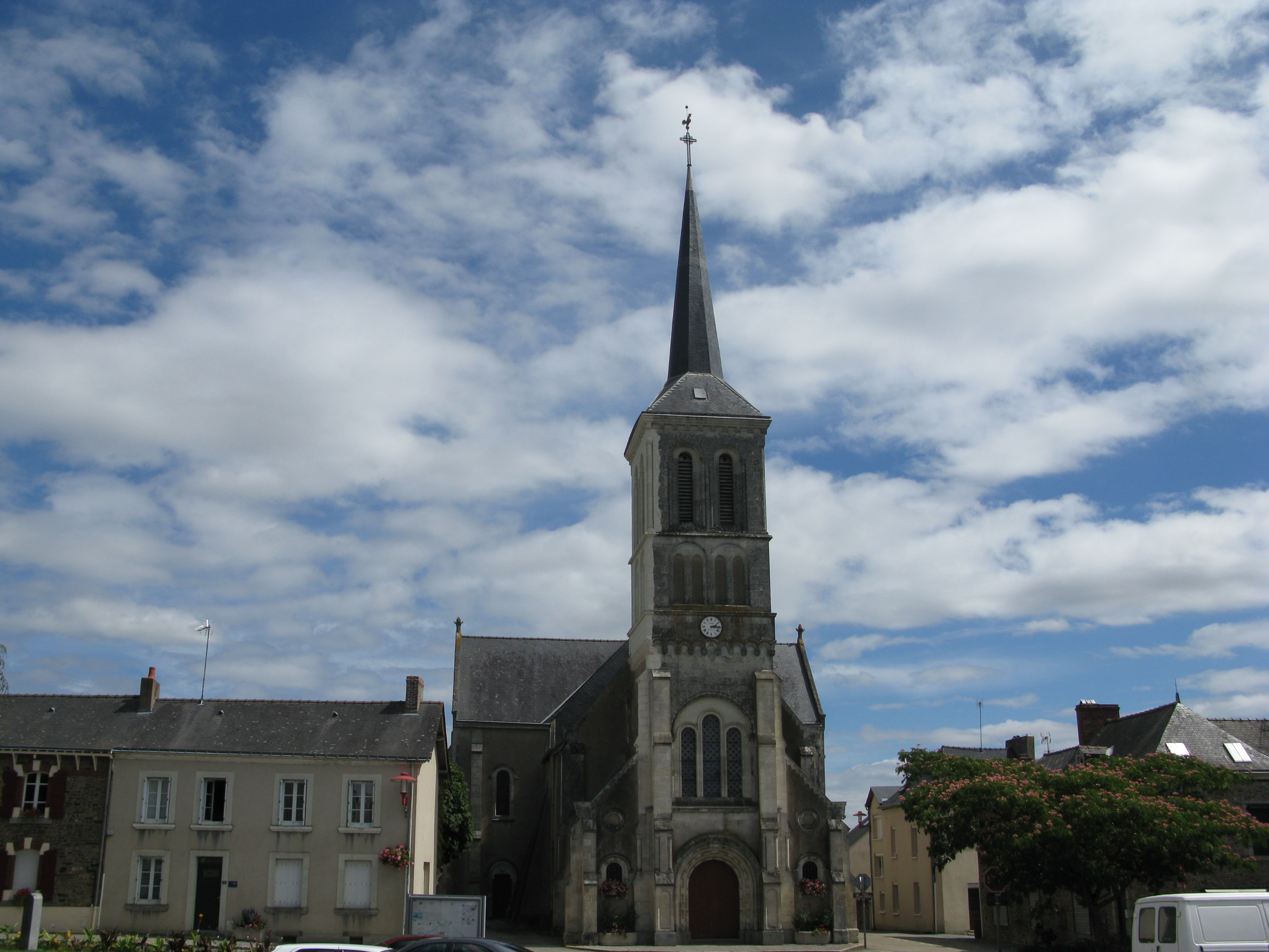 vue générale sur l'église de Loiron